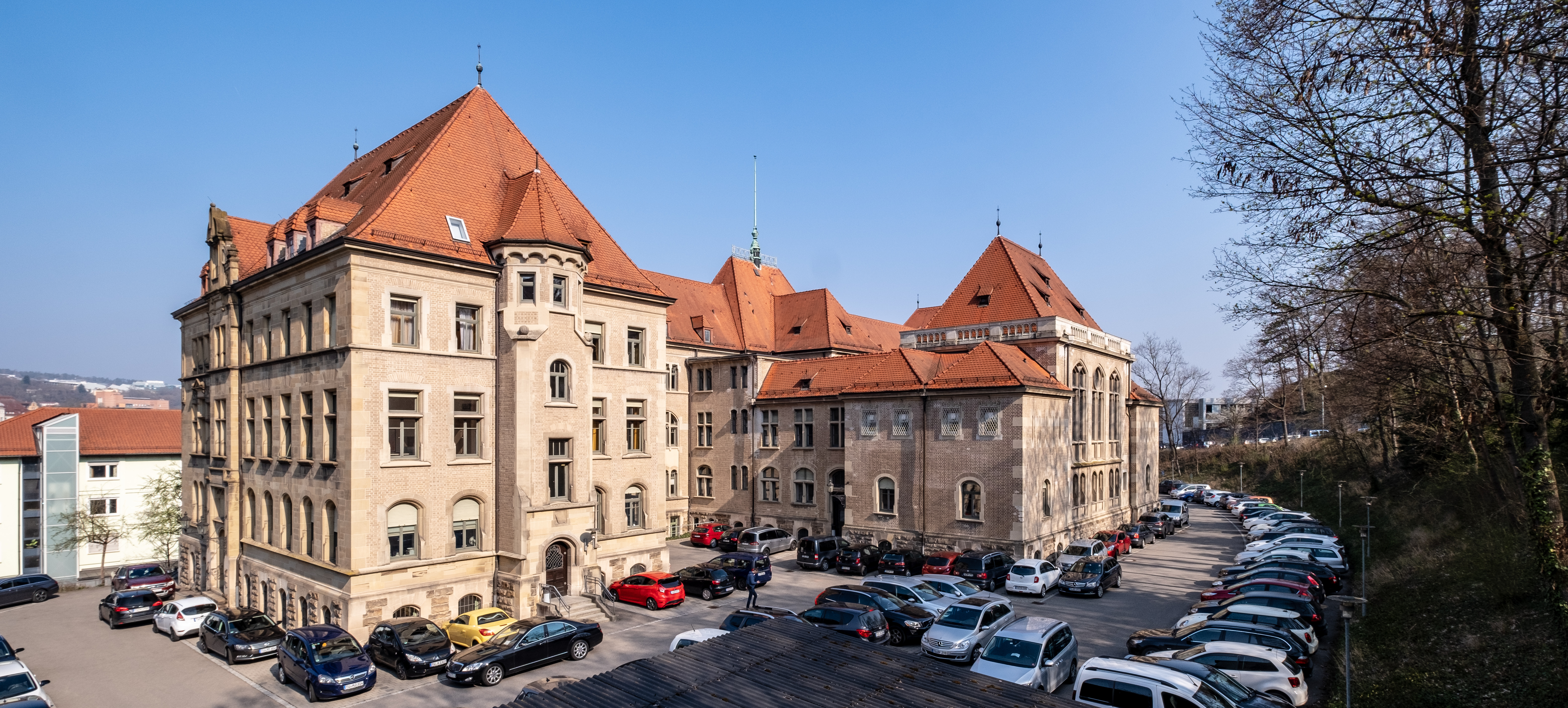 Justizpalast in Tübingen von Nordosten gesehen 2019